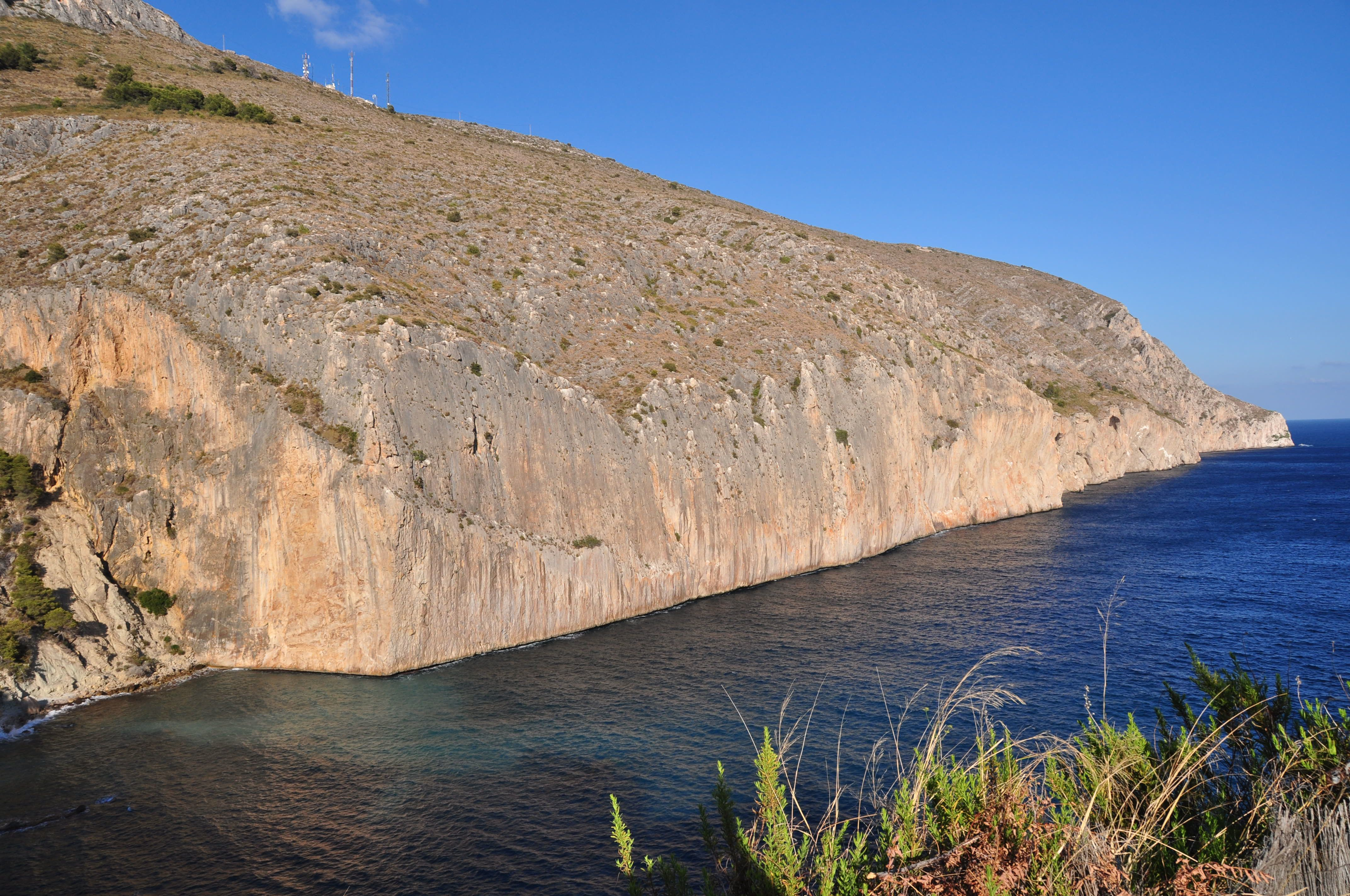 Cap de Toix entre les badies de Calp i Altea